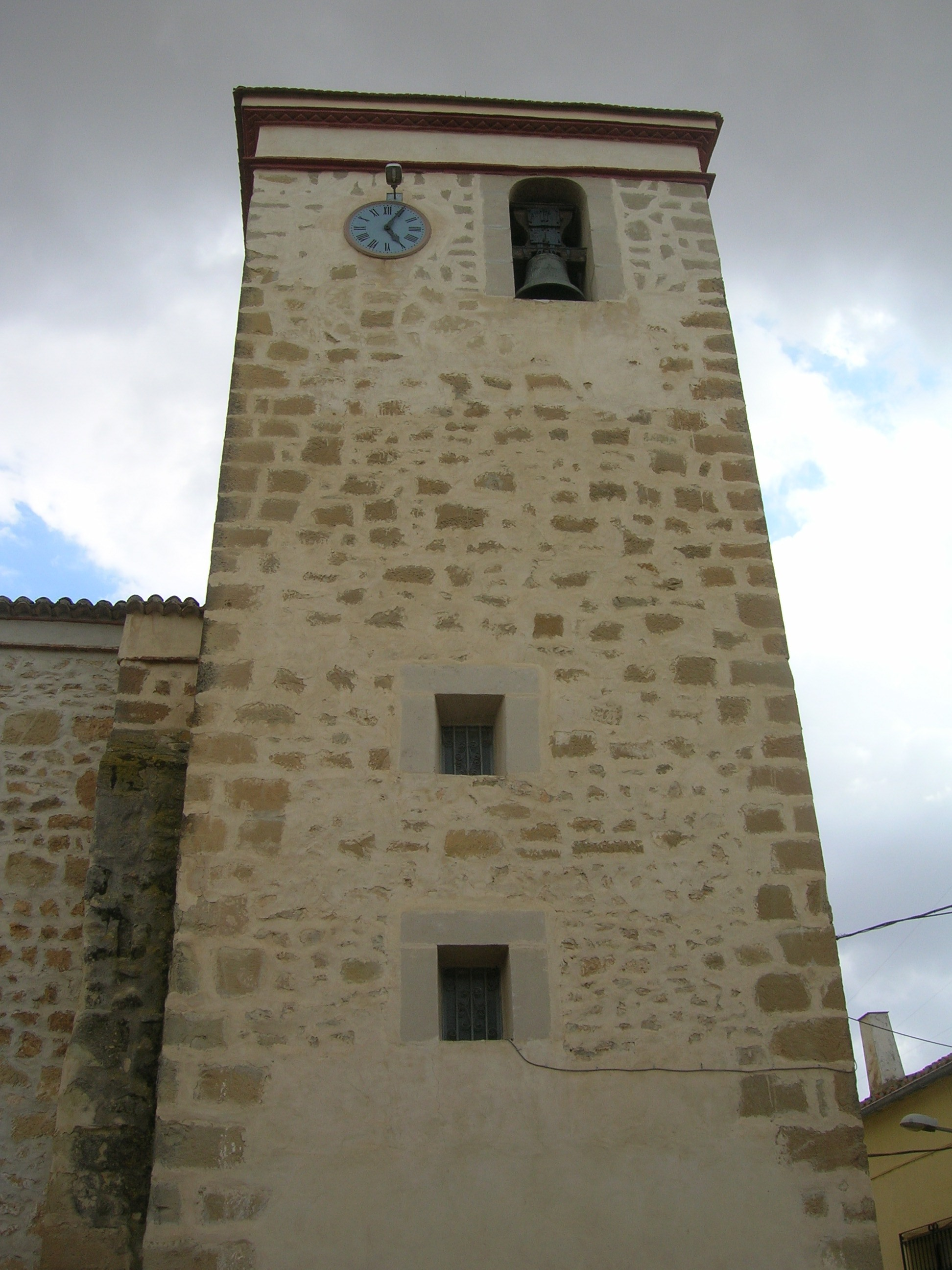 Torre de la iglesia de Bonete, en Albacete, Castilla-La Mancha, España.